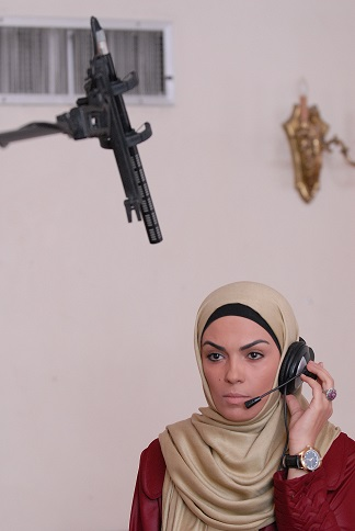 مجموعه تلویزیونی یک روزقبل - کارگردان: صادق کرمیار